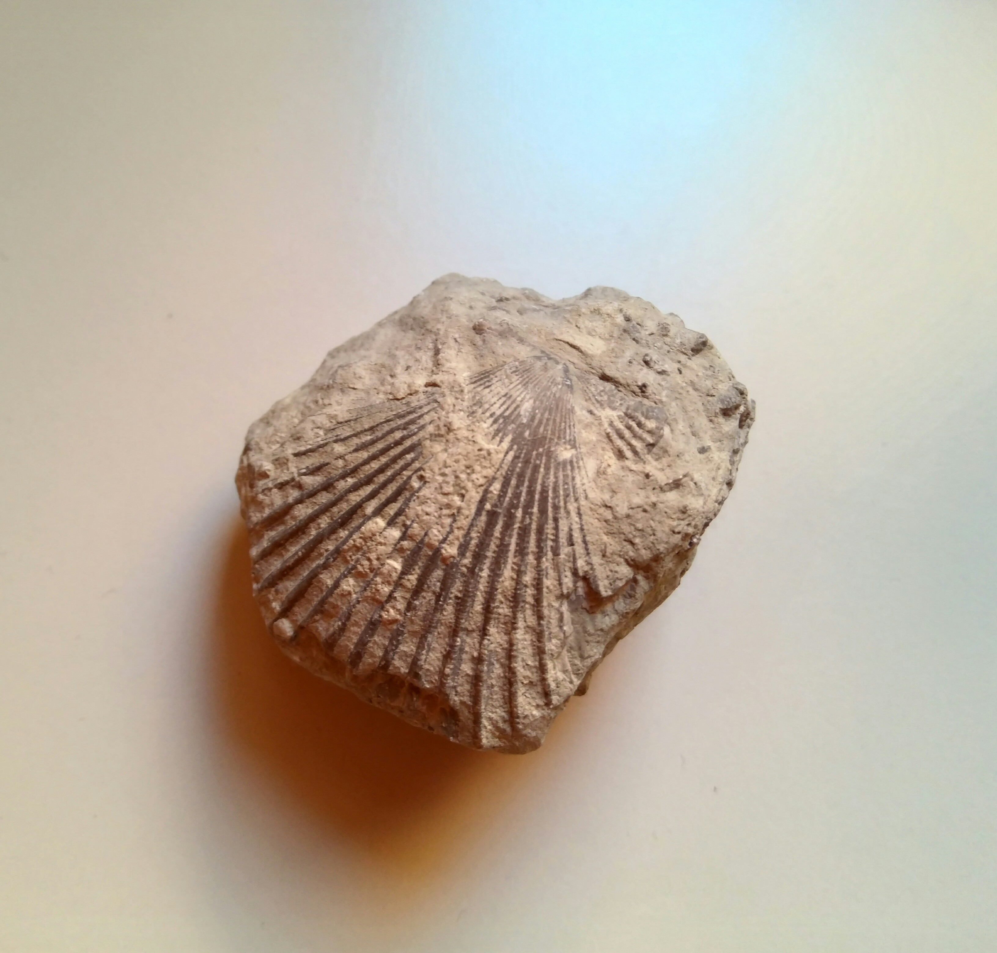 Pectinidae